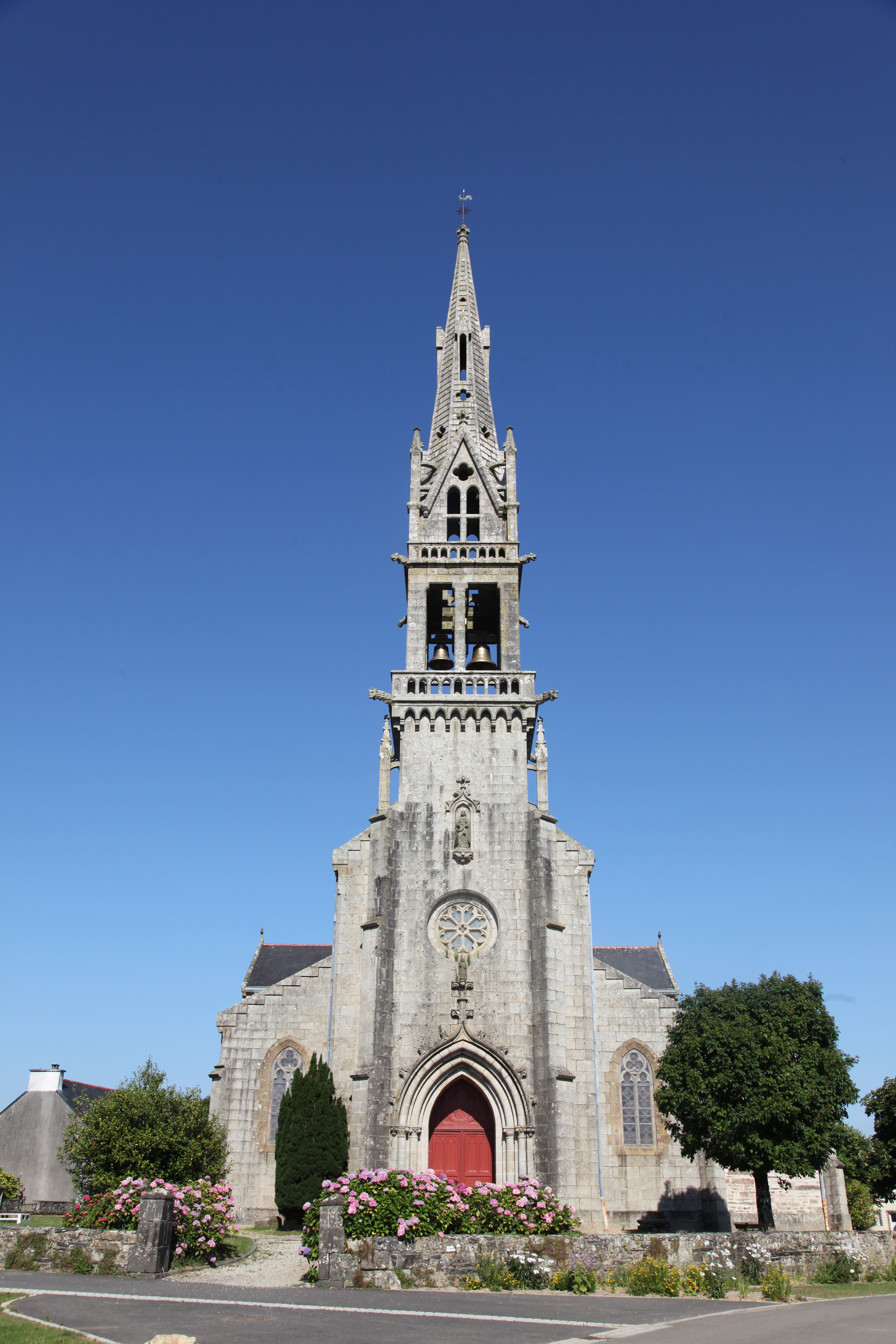 Église Saint-Pierre d'Hanvec - Façade ouest